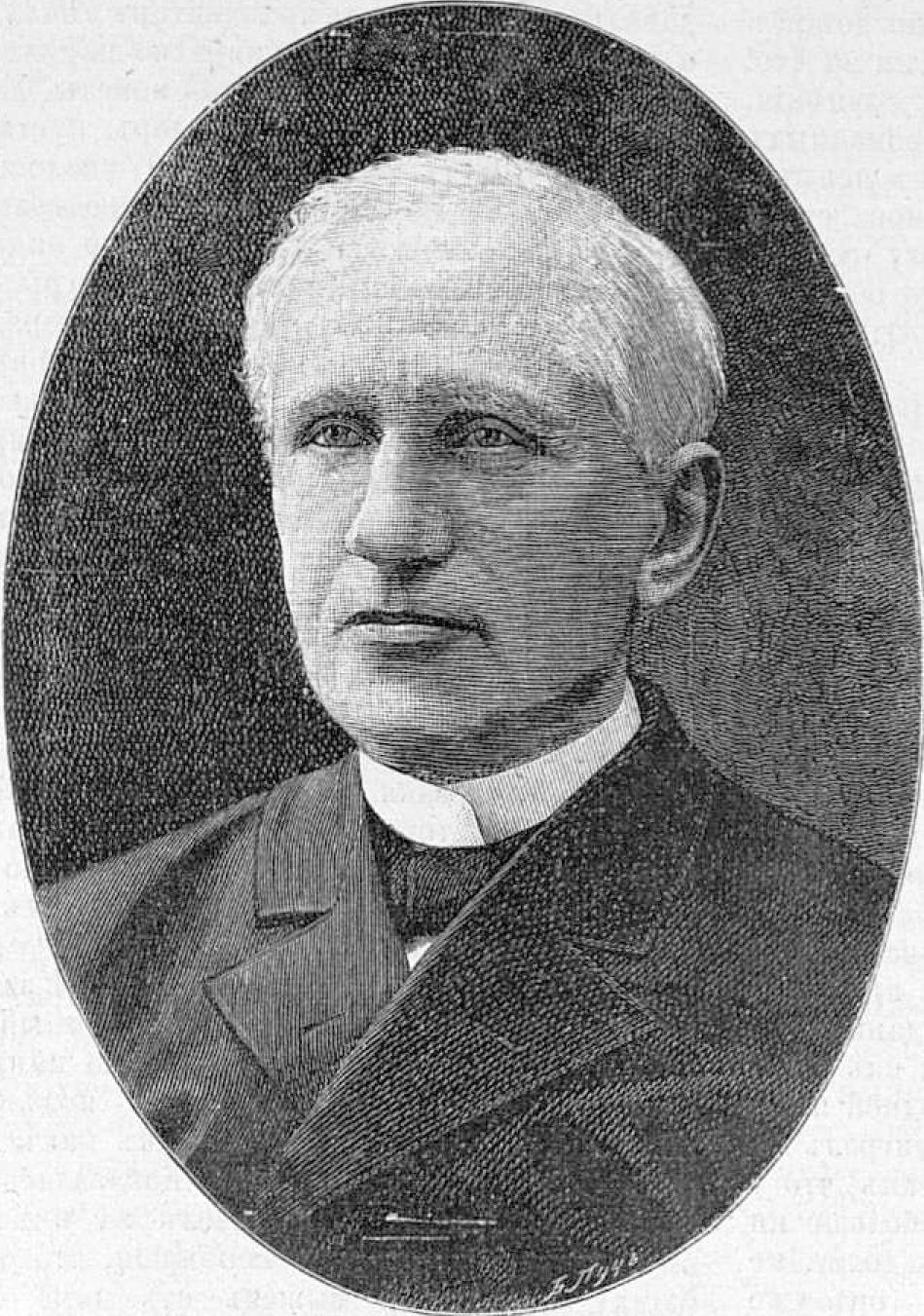 Феофилактов Константин Матвеевич, геолог